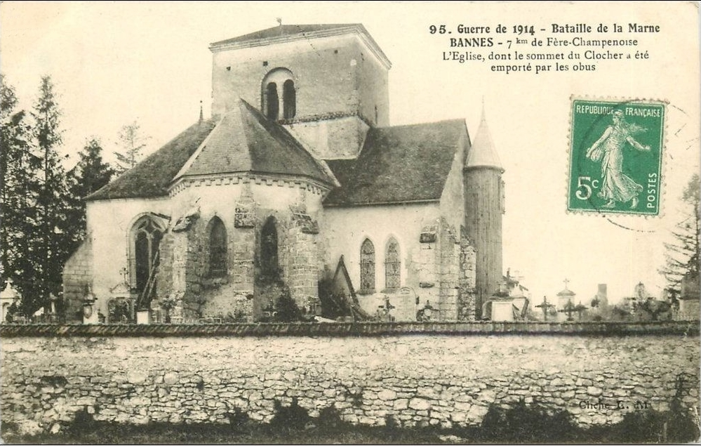 L'église de Bannes vers 1920